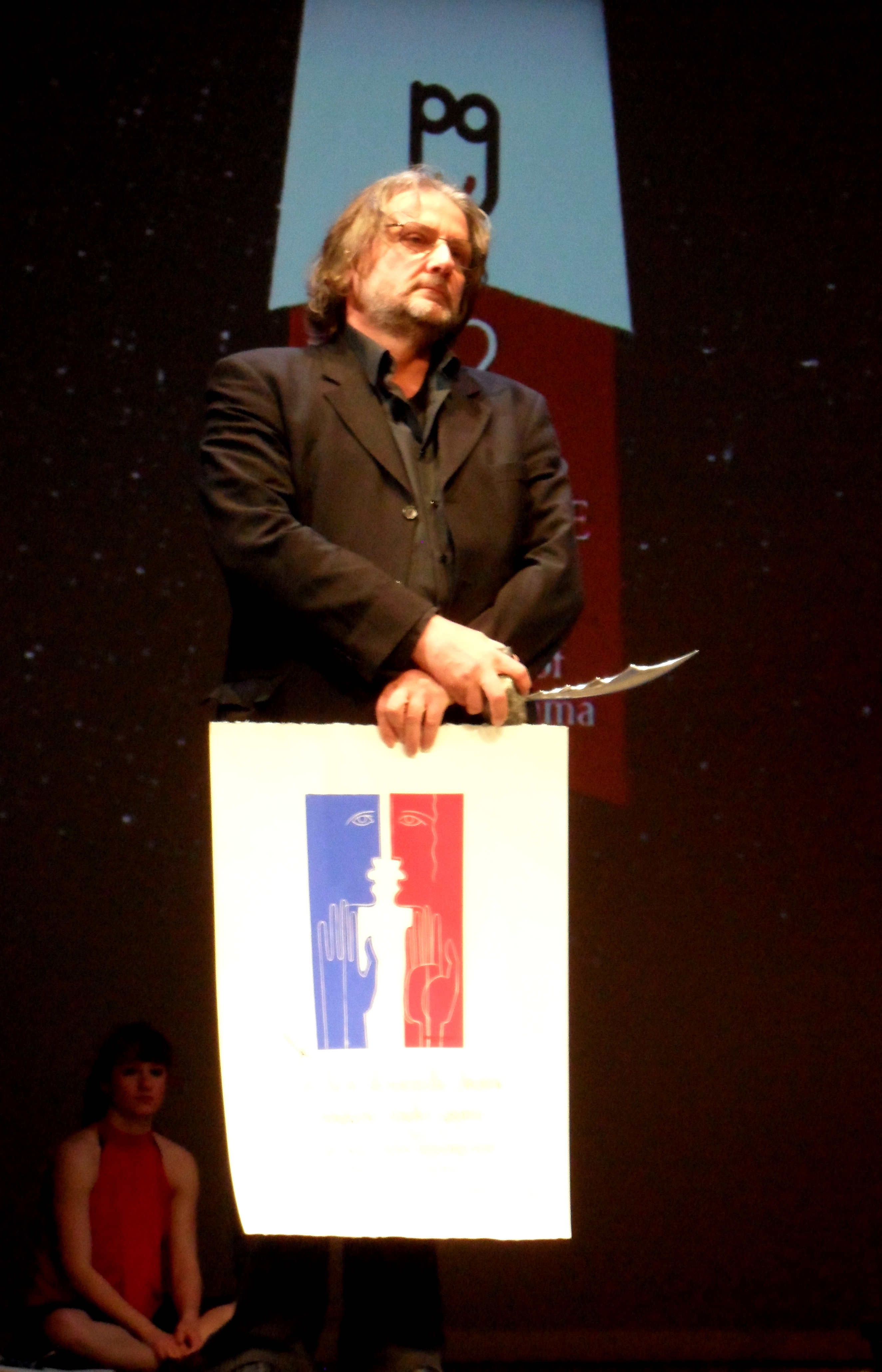 Vinko Möderndorfer aprila 2012 na Tednu slovenske drame v Kranju